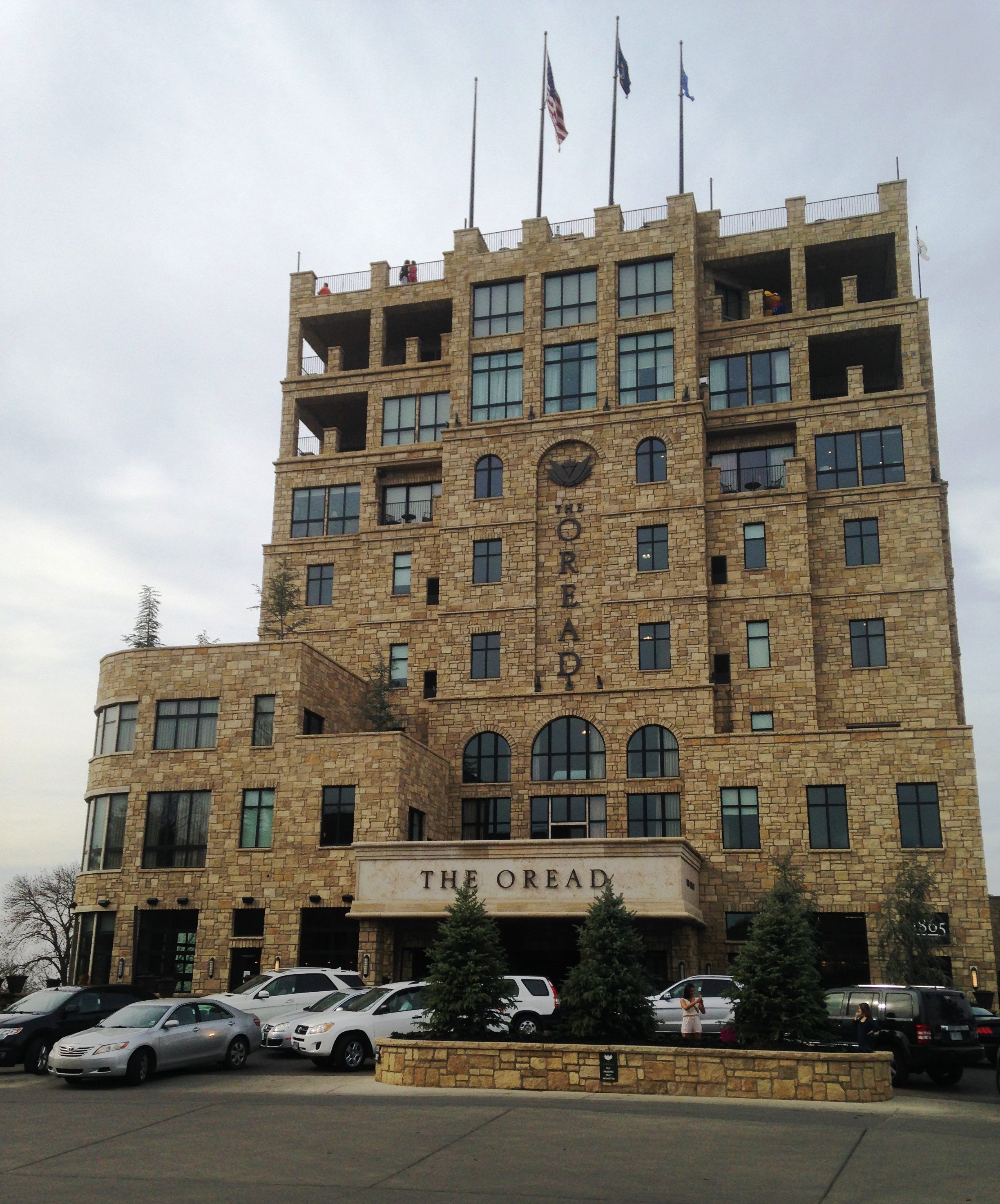 University of Kansas, Lawrence.